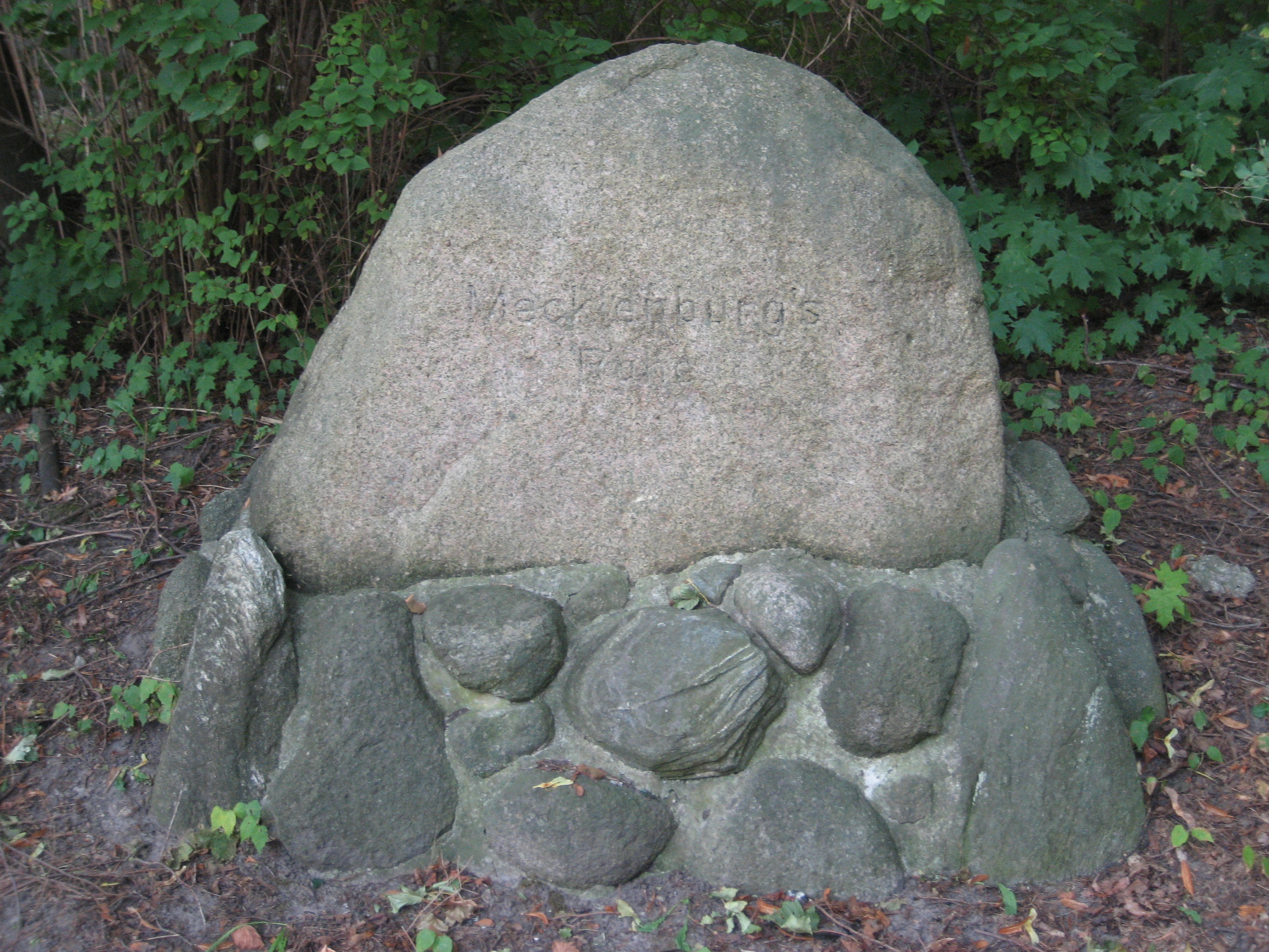 Auf Initiative von Friedrich Ludwig von Mecklenburg (1821-1884), eines Offiziers des Kürassier-Regiments in Pasewalk, der sich sehr um die Grüngestaltung der Stadt verdient gemacht hat, wurde zwischen 1865 und 1867 an der Löcknitzer Chaussee eine der ersten Parkanlagen der Stadt als Promenade angelegt, der später so genannte Park "Mecklenburgs Ruhe". In Erinnerung an ihn und sein Wirken ließ die Stadt Pasewalk 1934 am östlichen Ende des Parks einen Feldstein - den "Mecklenburg-Stein"- als Denkmal errichten, mit der Inschrift: "Mecklenburg's Ruhe".